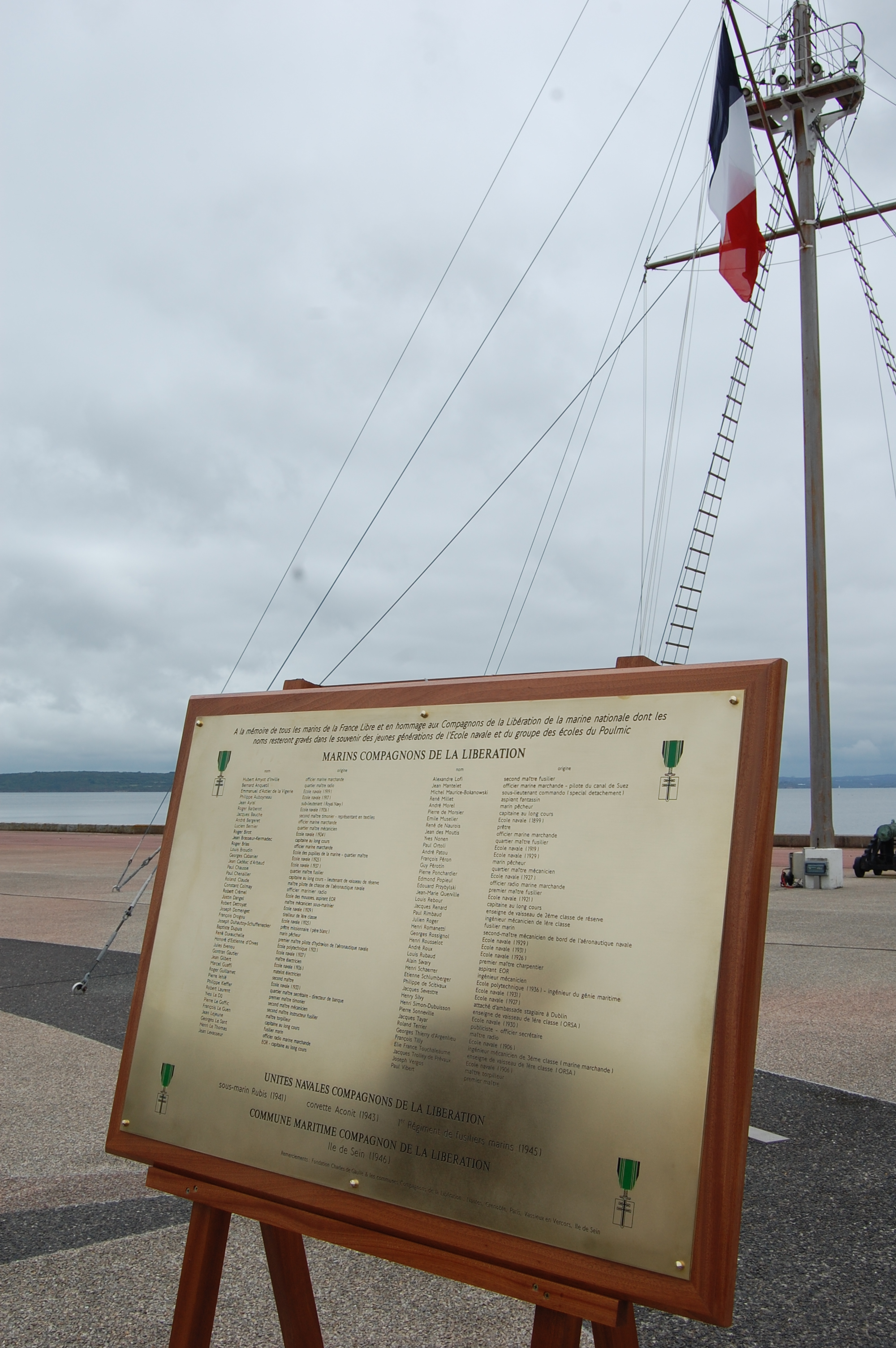 Présentation de la plaque commémorative des marins Compagnons de la Libération à l'Ecole navale